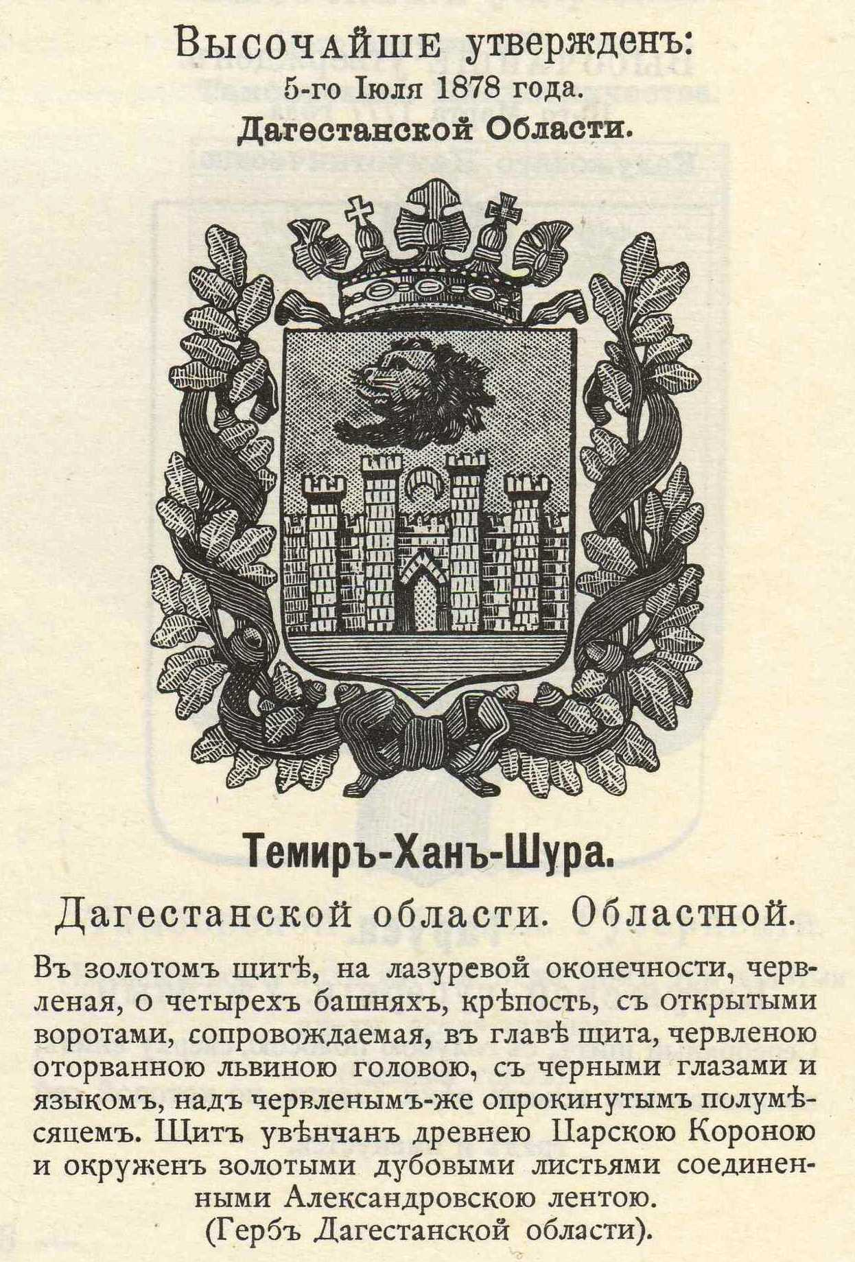 Official Russian Empire coat of arm. Герб Российской Империи областного города Темир-Хан-Шура Дагестанской области с официальным описанием в Гербовнике Винклера.